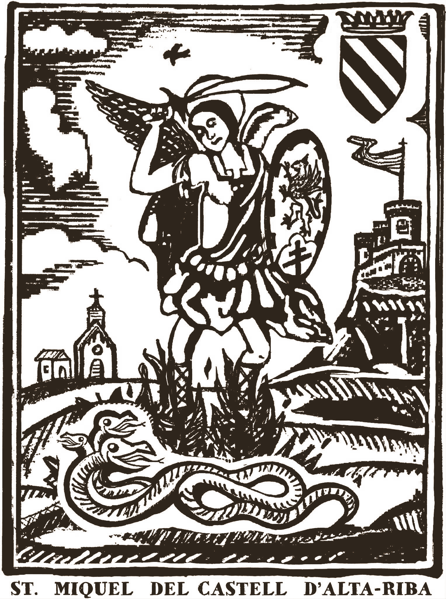 Gravat del Castell Sant Miquel d'Alta-riba, del municipi d'Estaràs, La Segarra